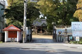 椋橋総社境内前